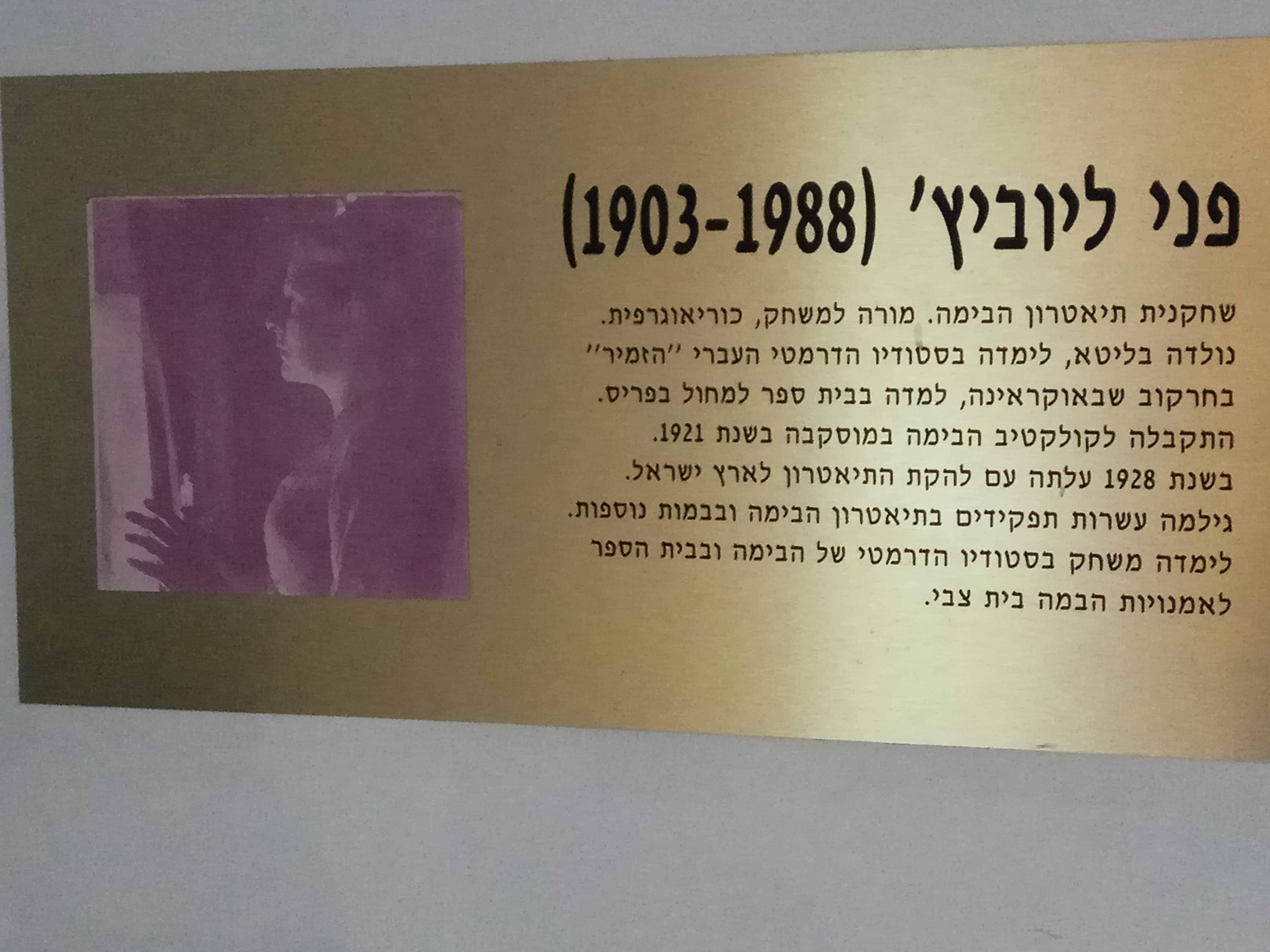 לוחית זיכרון לשחקנית פאני לוביץ בבית צבי